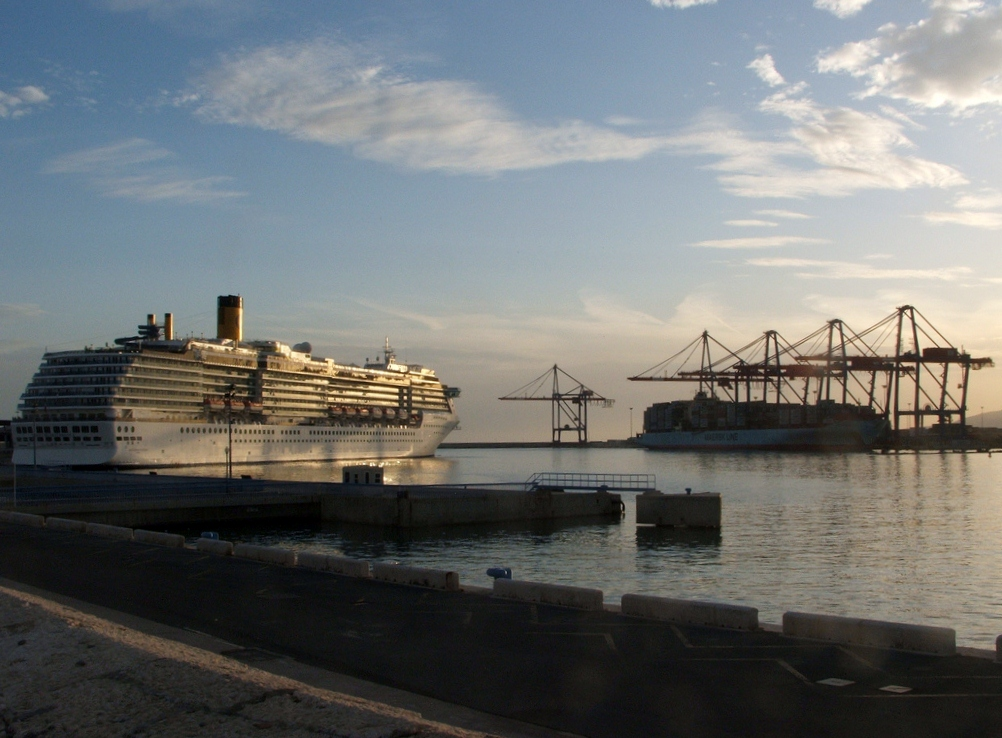 Puerto de Málaga, España.Unknown malaga harbour, spain.